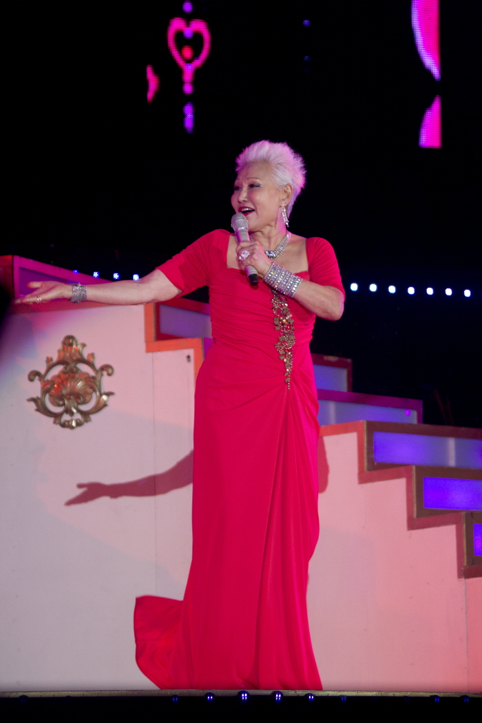 가수 패티 김